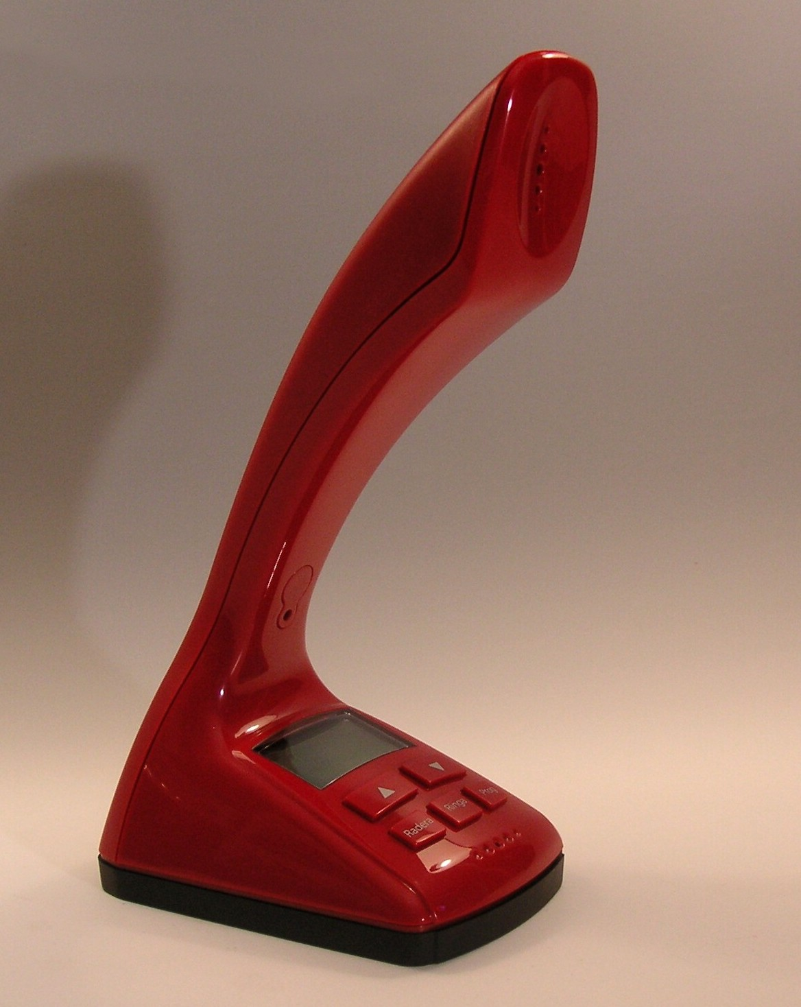 Telias nya "Kobratelefon" år 2007